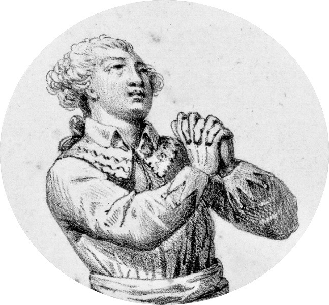 Jean-Baptiste Guignard genannt Clairval (1735–1797), Tenor, in der Rolle des Sängers Blondel in Grétrys Oper "Richard Cœur-de-Lion" (1784)